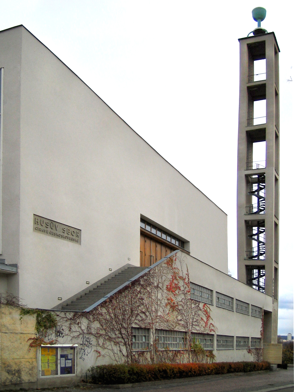 Husův sbor v Praze 10, Vinohrady. Vlastní foto.